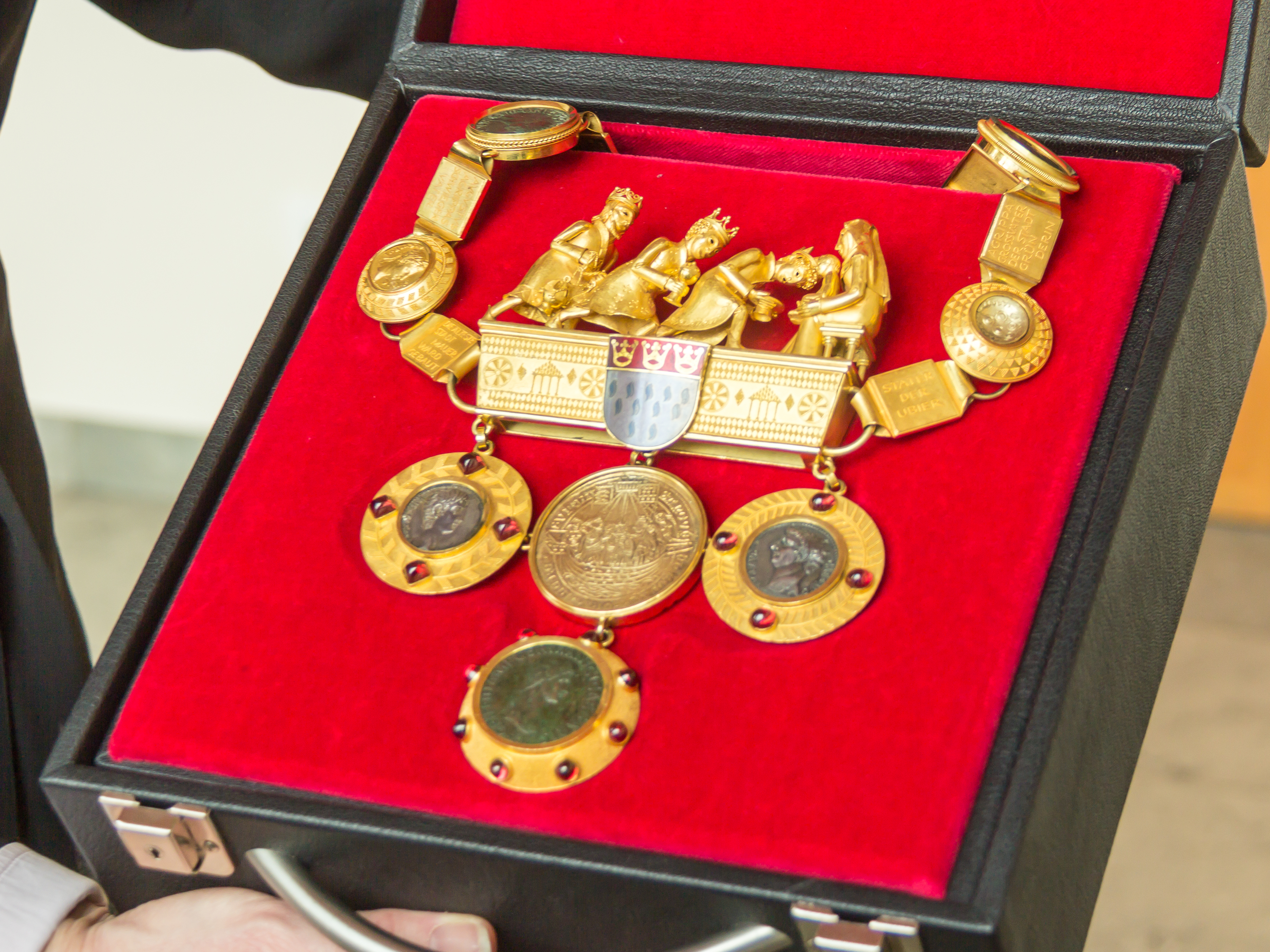 Vereidigung und Amtseinführung von Oberbürgermeisterin Henriette Reker Foto: Amtskette